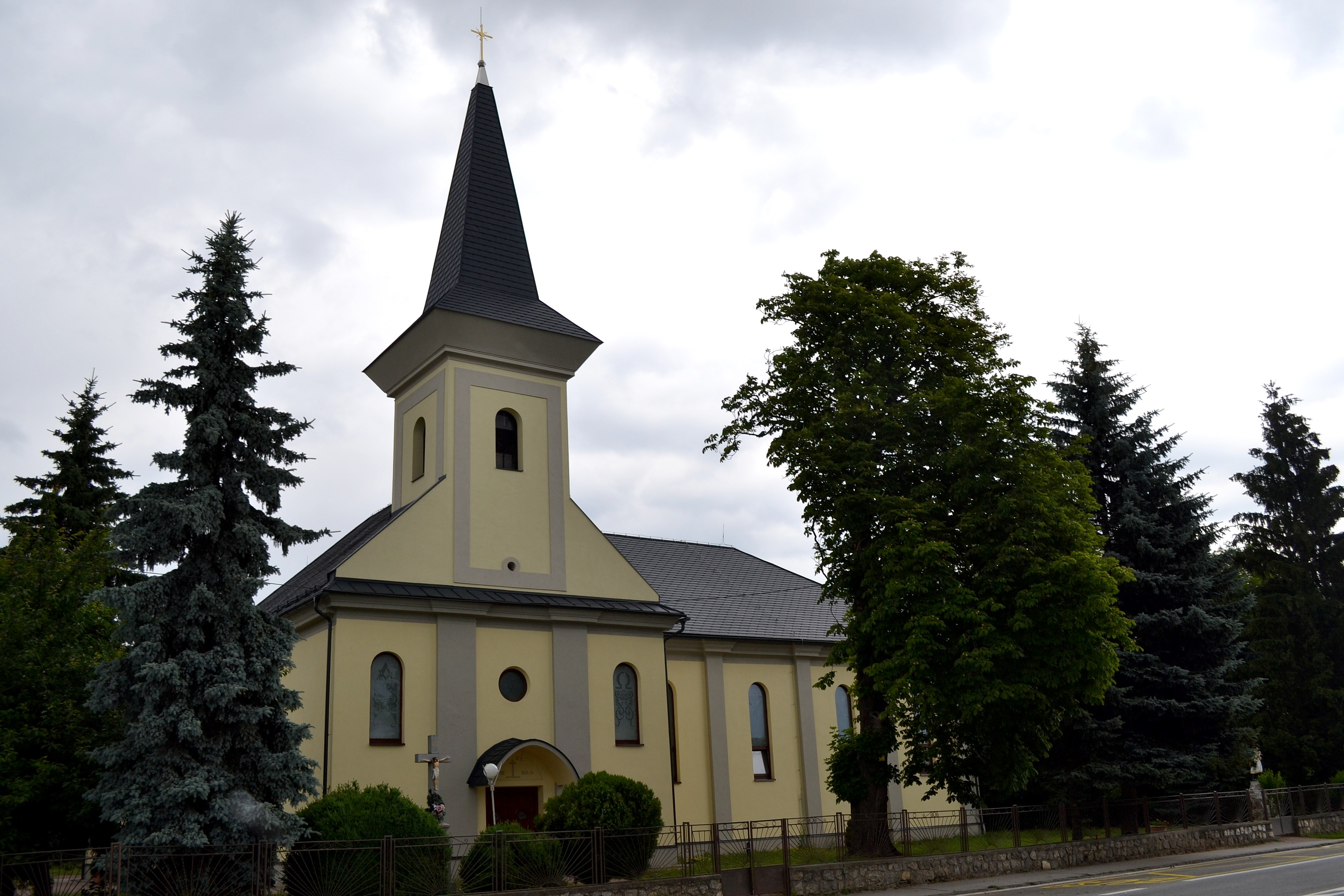 Čečejovce (okr. Košice-okolie), Kostol svätého Jána Evanjelistu